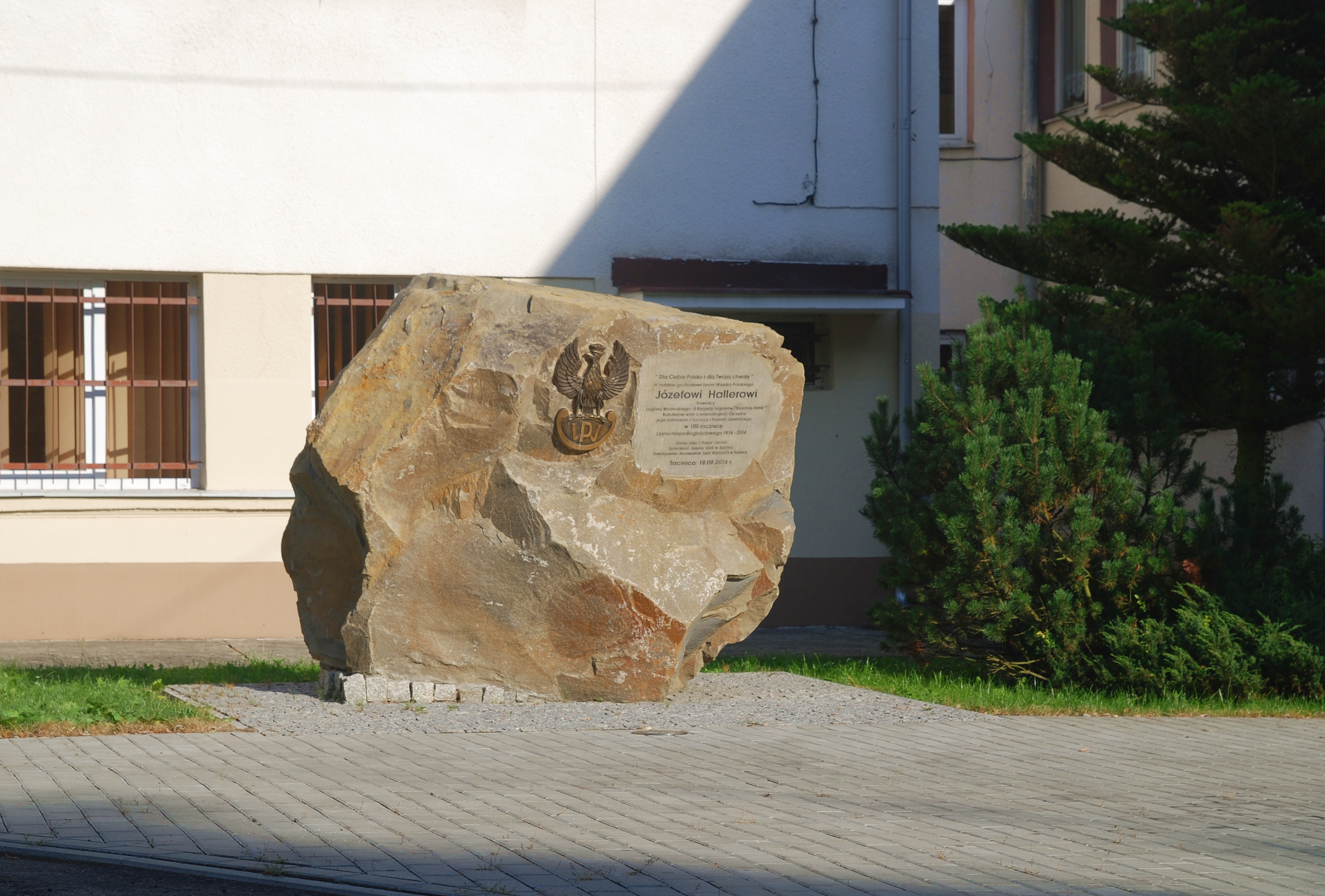 szkoła